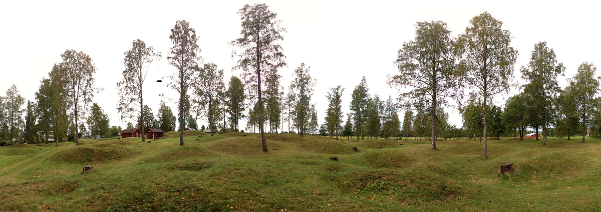 Värmlands största gravfält.